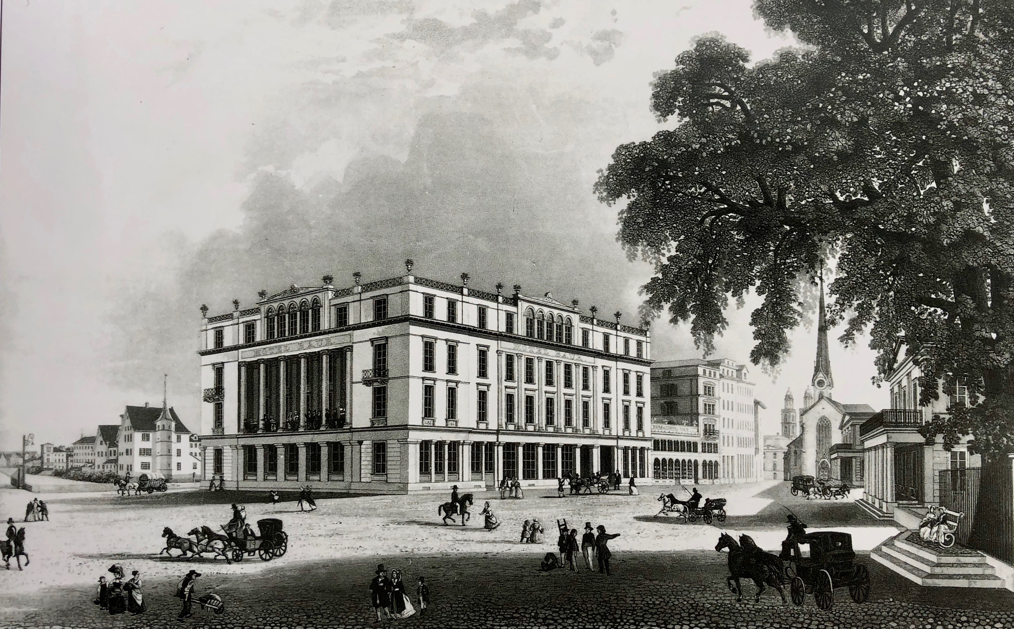 Hotel Baur en Ville im Eröffnungsjahr 1838. Links die Bahnhofstrasse, rechts die am 25. März 1857 gefällte Tiefenhoflinde